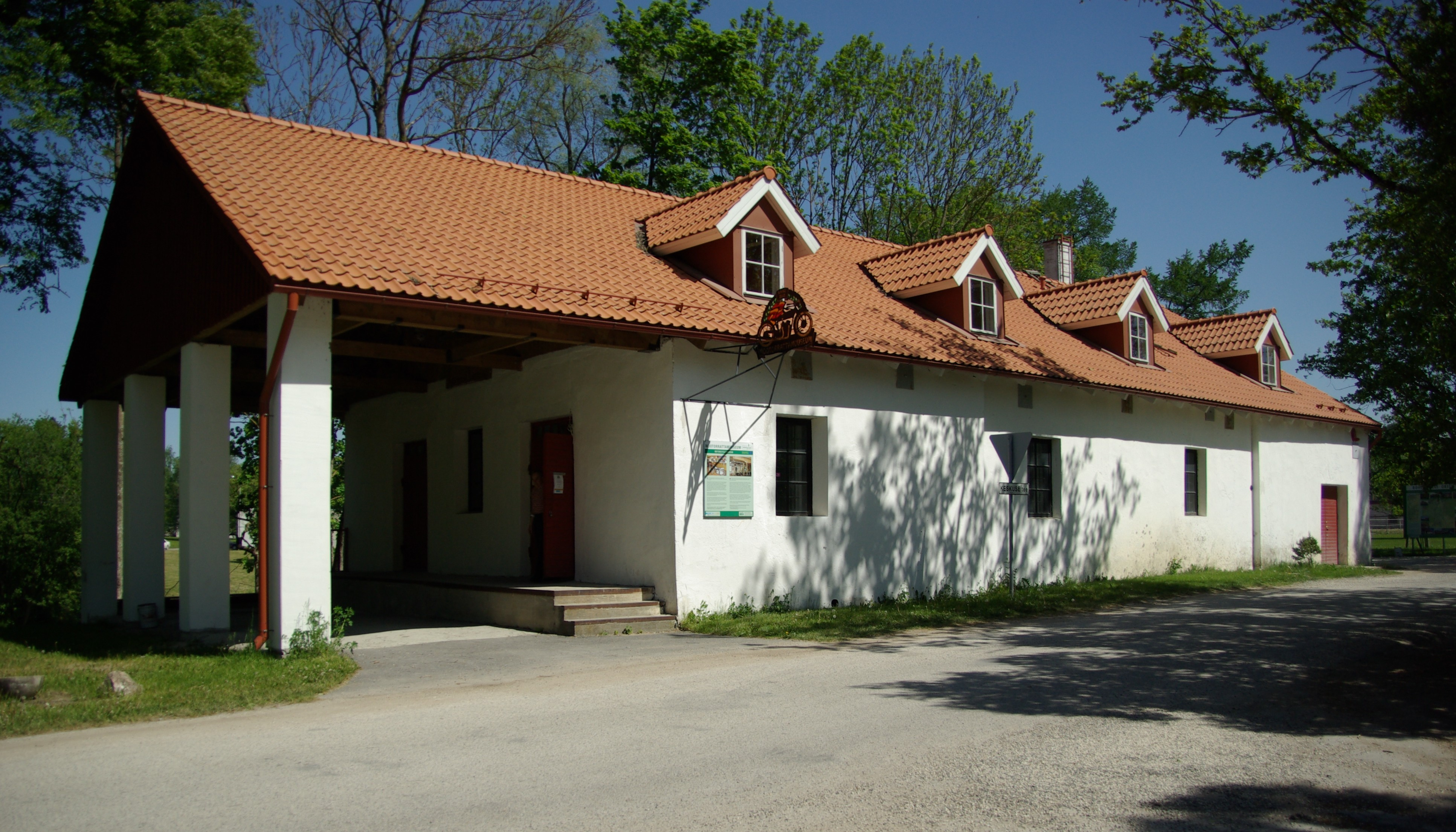 Harjumaa, Saku vald, Kurtna küla, Tagadi tee 1. Baltimaade suurima vanaaegsete mootorrataste väljapanekuga eramuuseum. Endine Kurtna mõisa abihoone